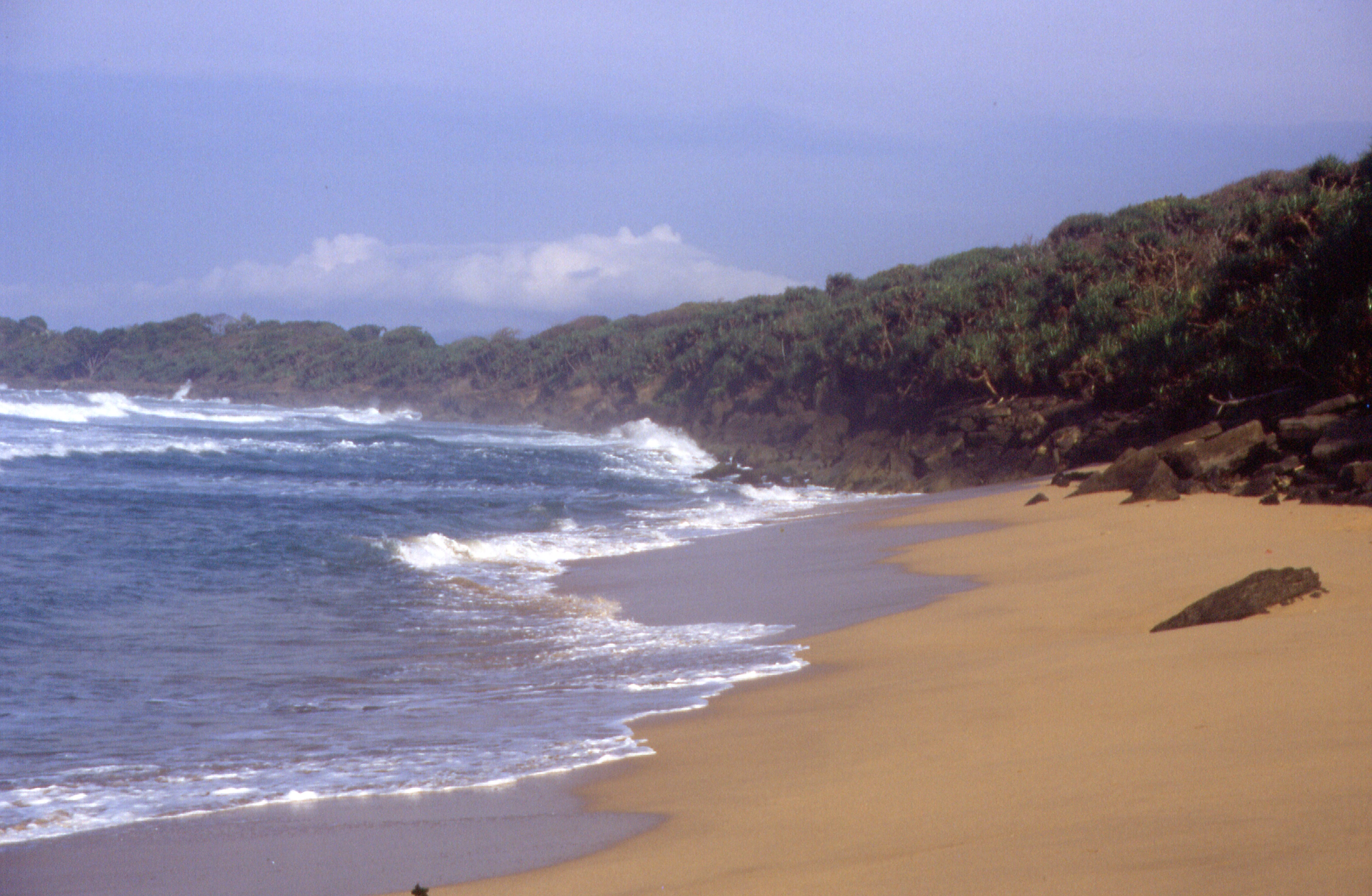 Südküste im Ujung Kulon-Nationalparks